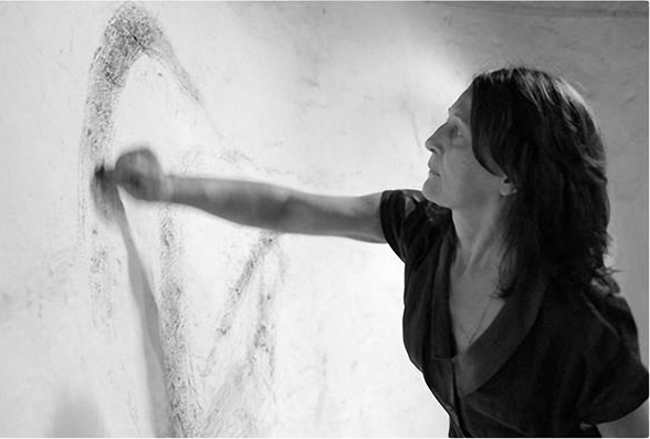 Portrait der Künstlerin Barbara Szüts